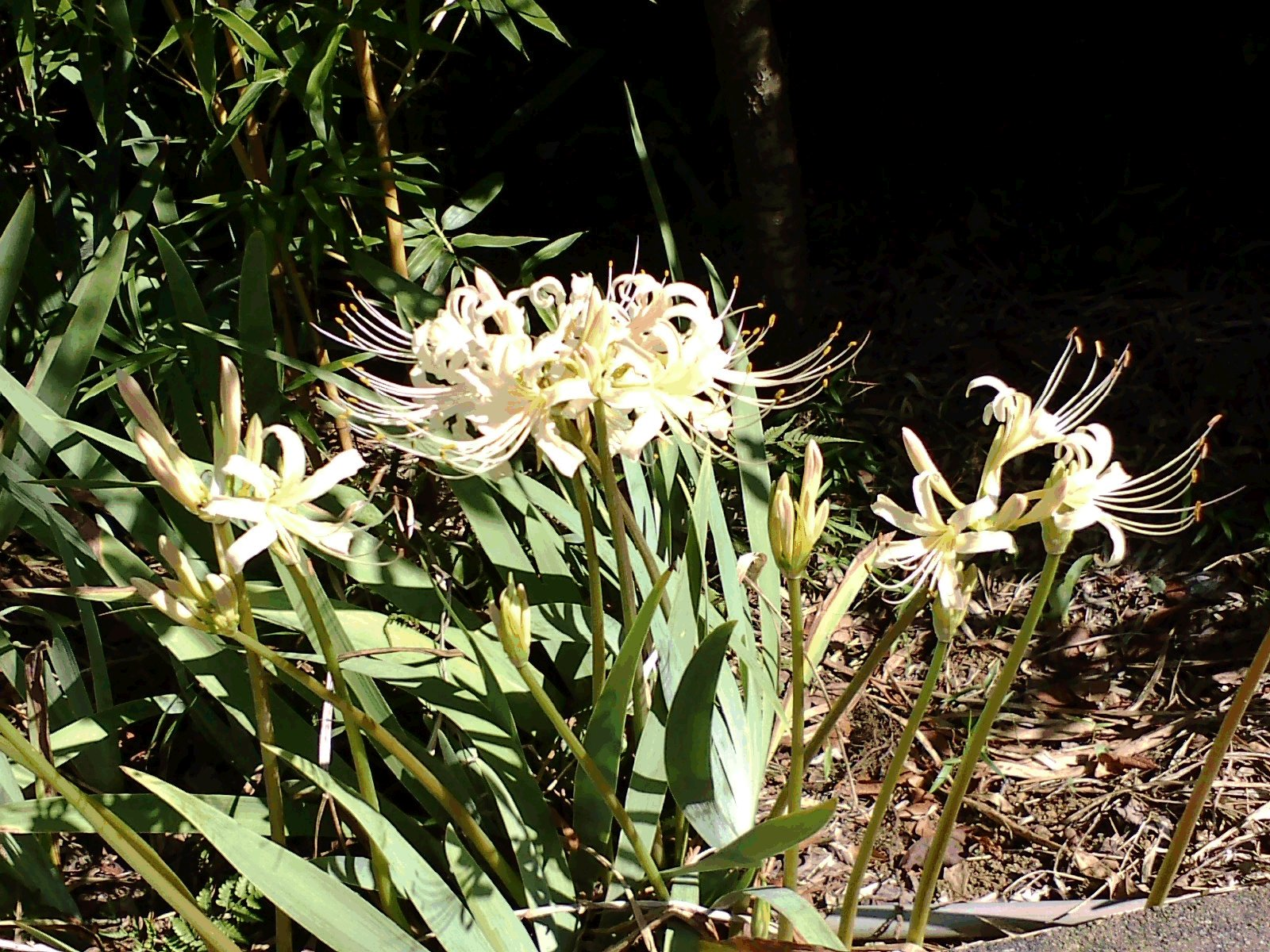 Lycoris albiflora Koidz （シロバナマンジュシャゲ（白花曼珠沙華） ヒガンバナ科）